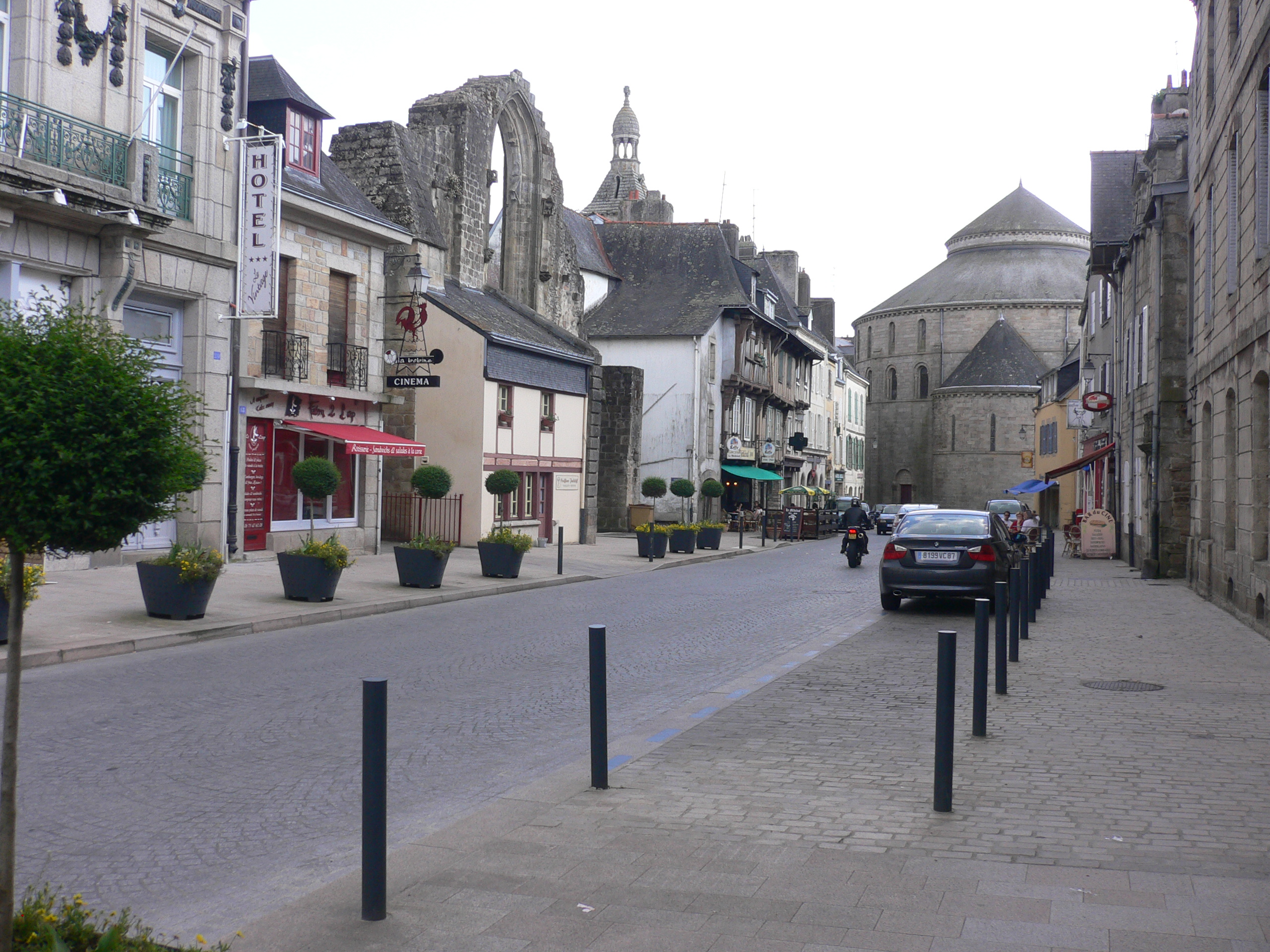 la rue Brémond d'Ars à Quimperlé